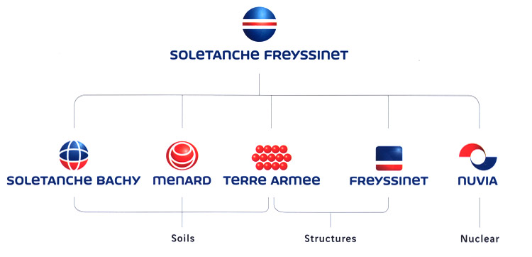 SF orga